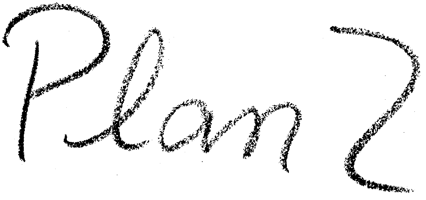 El "Plan Z" que aparece la pagina 53 del "Libro blanco del cambio de gobierno en Chile".